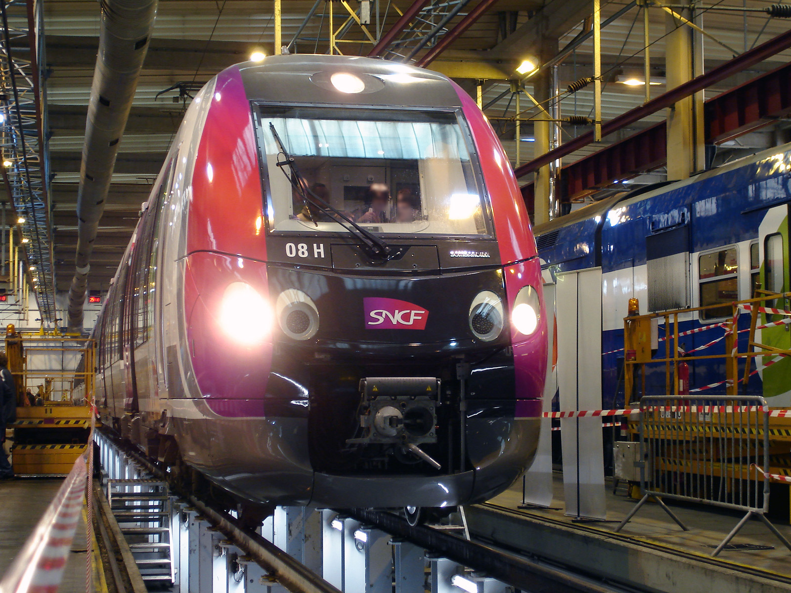 Z 50000 au technicentre Paris Nord-Joncherolles, Villetaneuse, Seine-Saint-Denis, France.